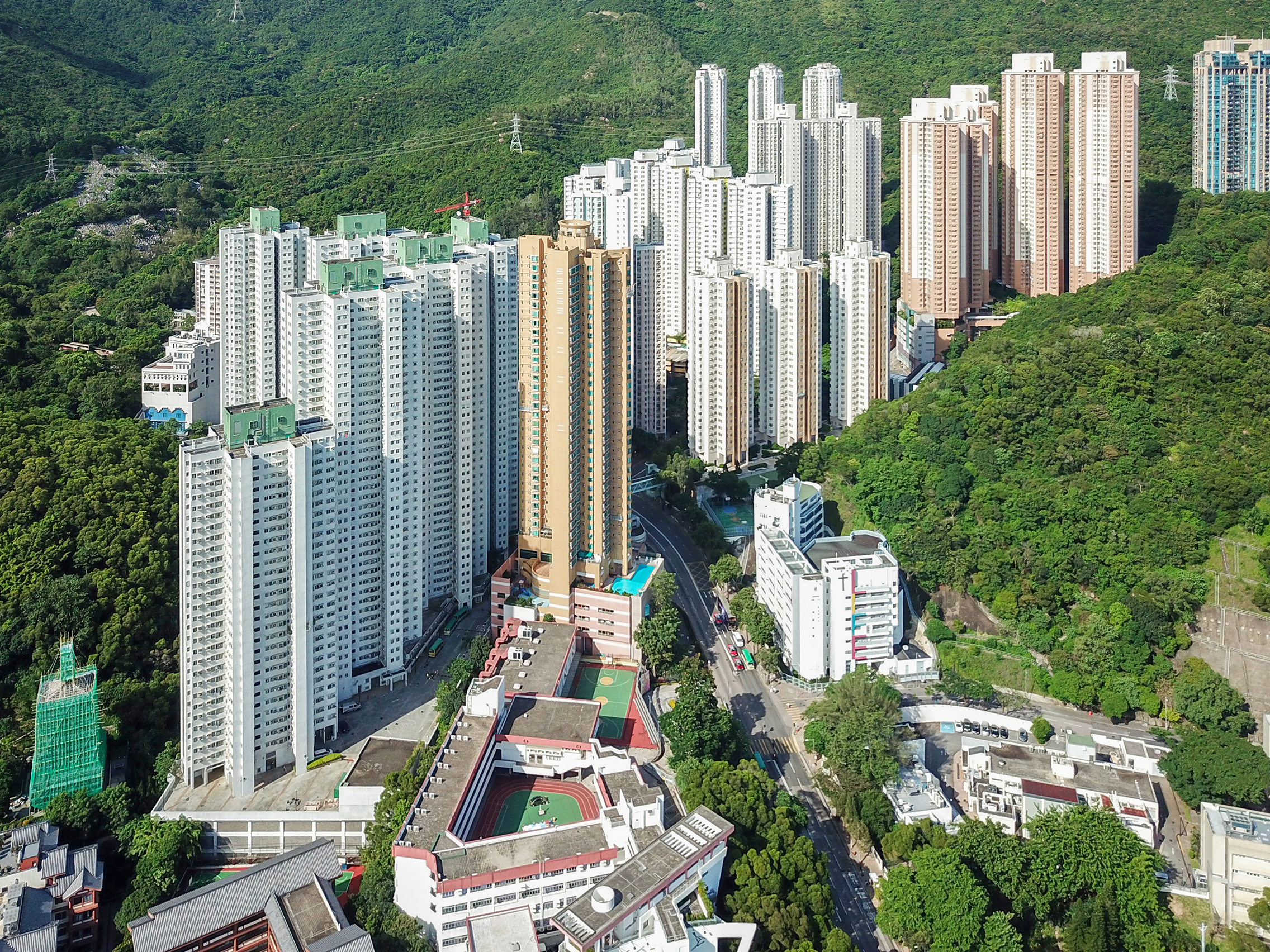 Buildings in Hammer Hill